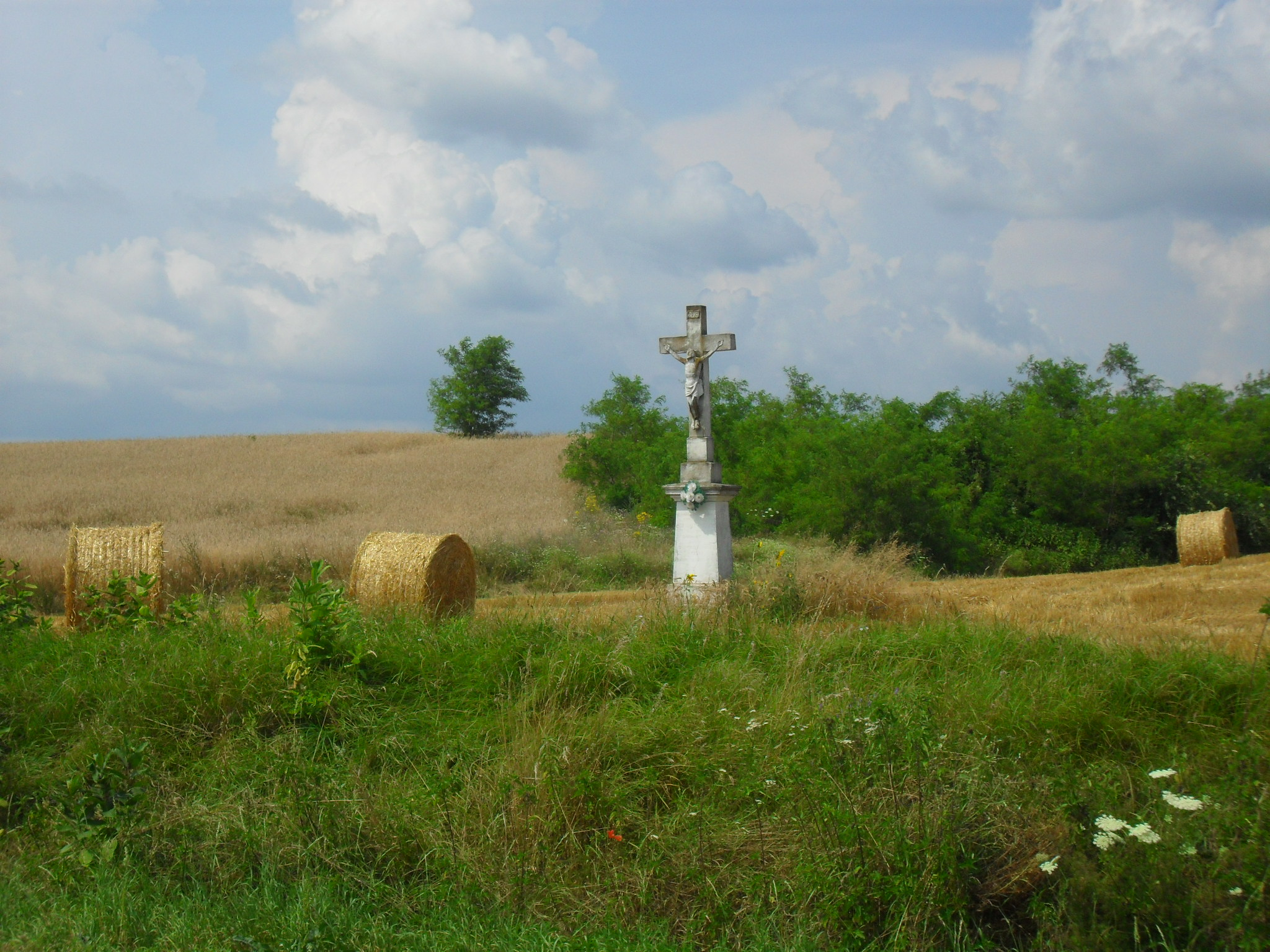 Hugyag - feszület a község határában, az Őrhalom-Szécsény (22-es) országút mellett